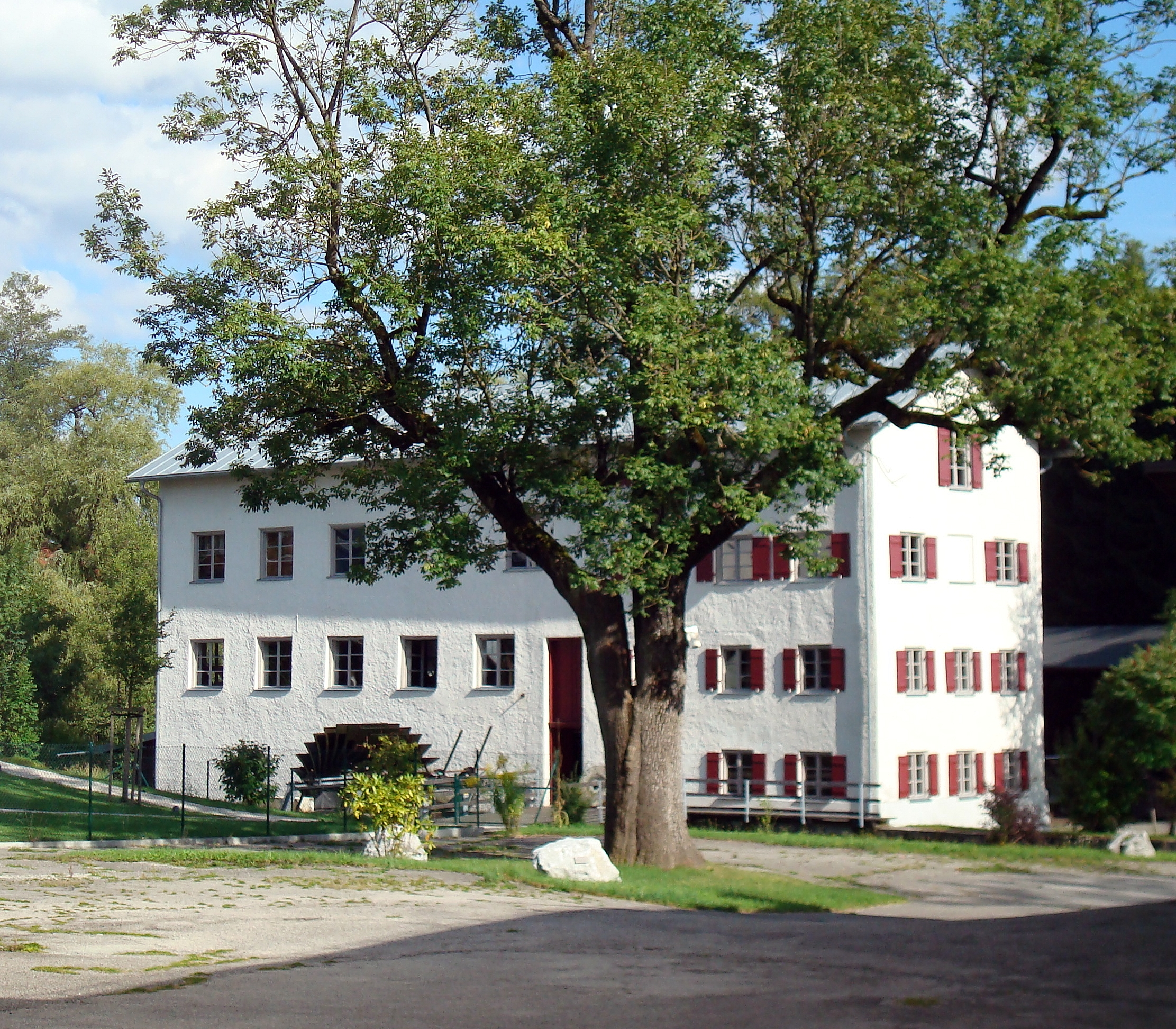 Krailling, Margaretenstraße 55, sog. Linner Mühle. Ehem. Getreidemühle der Linner KG, 1892 als dreigeschossiger Satteldachbau unter Verwendung von Teilen der Vorgängermühle auf dem Areal des früheren Hofmarkschlosses Krailling errichtet; mit technischer Ausstattung; zugehörig zwei hölzerne Schaufelmühlräder, Mühlbach und Wehre. This is a photograph of an architectural monument.